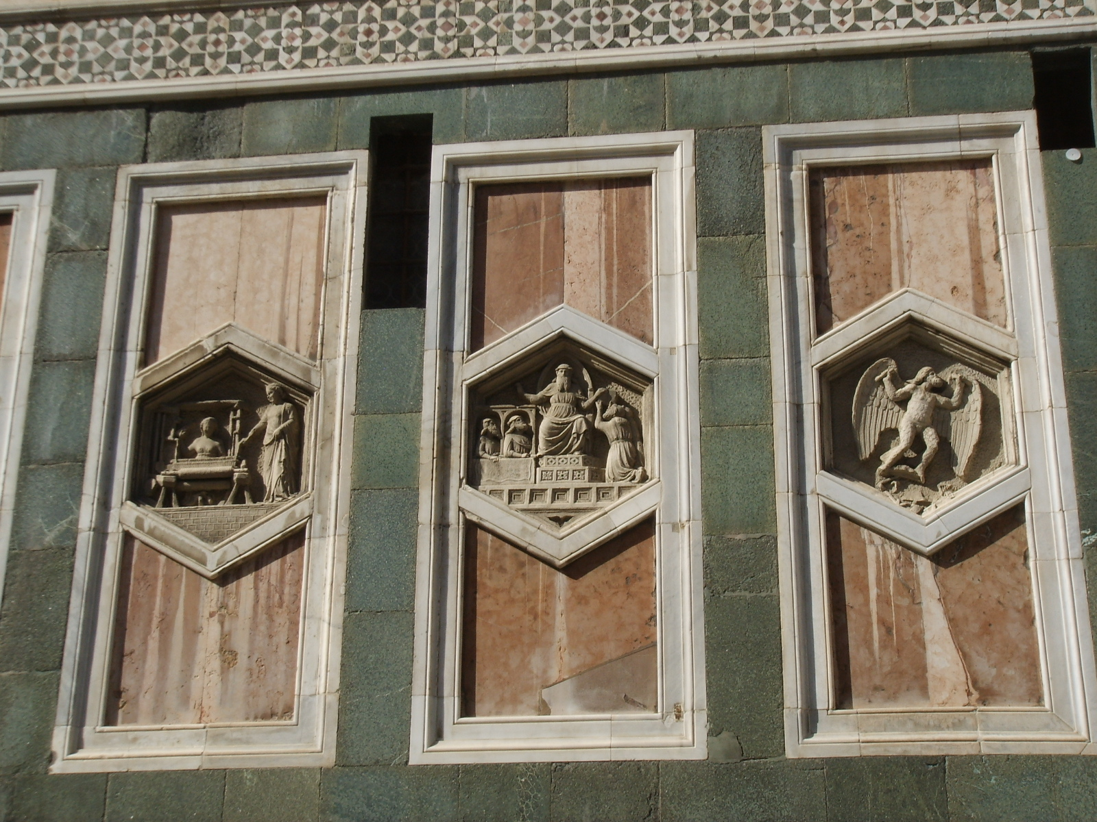 Formelle campanile di giotto